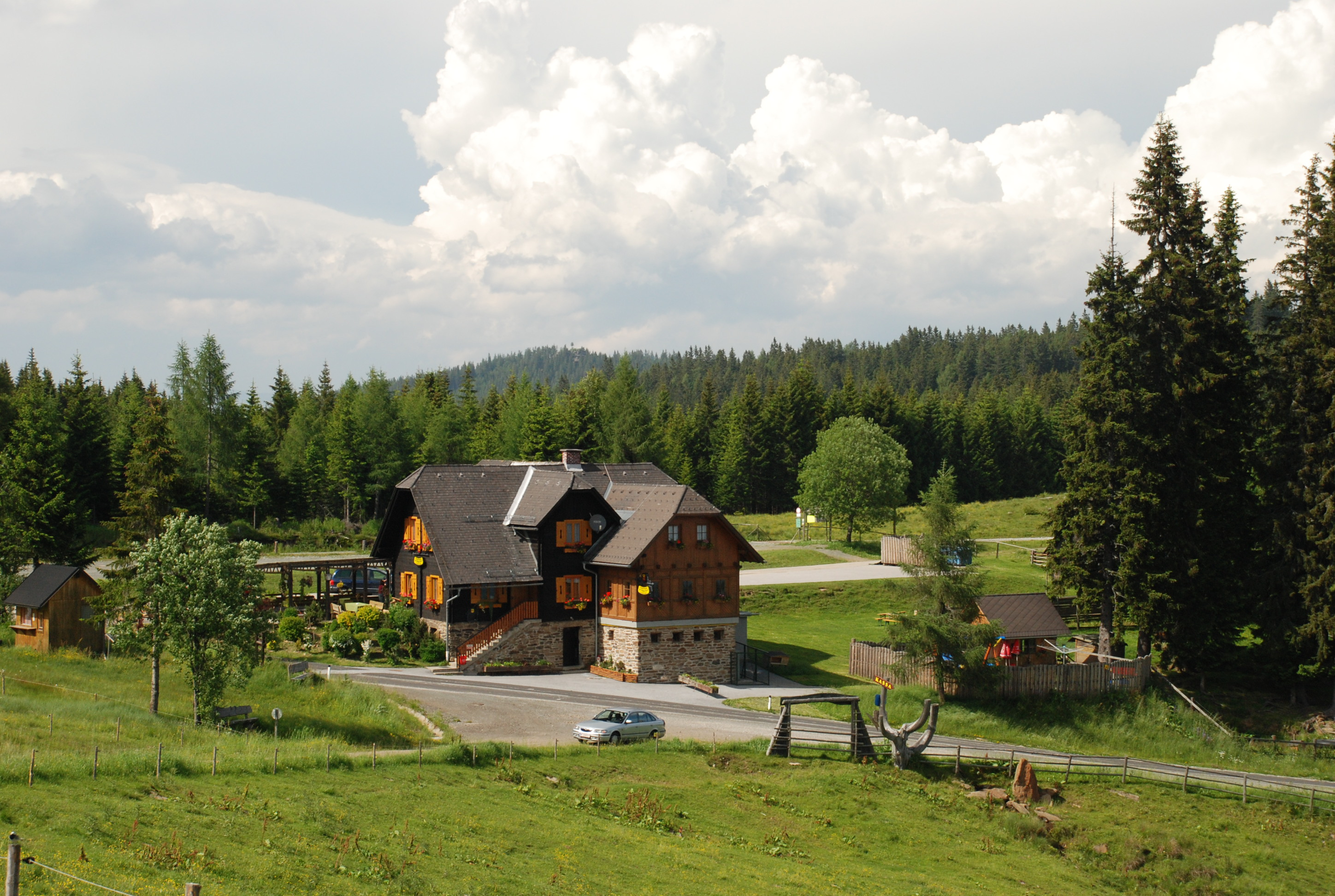 Hebalmschutzhaus